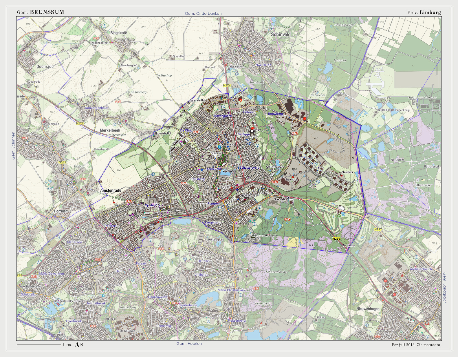 Topografische kaart van gemeente Brunssum (2013). Samengesteld door Jan-Willem van Aalst op basis van de GML open geodata van de BRT/Top10NL (basisregistratie Topografie, Kadaster 2011), vrijgegeven door Kadaster onder de Creative Commons BY licentie. Additionele gegevens uit BAG (8 juli 2013), uit de Open Street Map (9 juli 2013) en uit de Risicokaart. Peildatum kaartbeeld: 9 juli 2013. Zie ook Gemeentenatlas.nl Samenstelling en kleurenschema: Jan-Willem van Aalst, met QuantumGIS en Photoshop. Zie ook de Legenda.